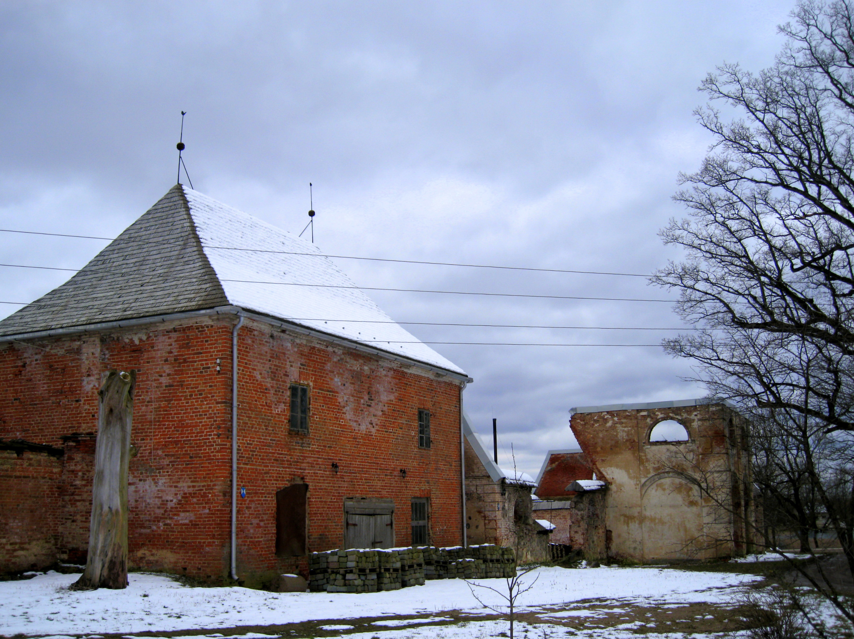 Kabile Manor